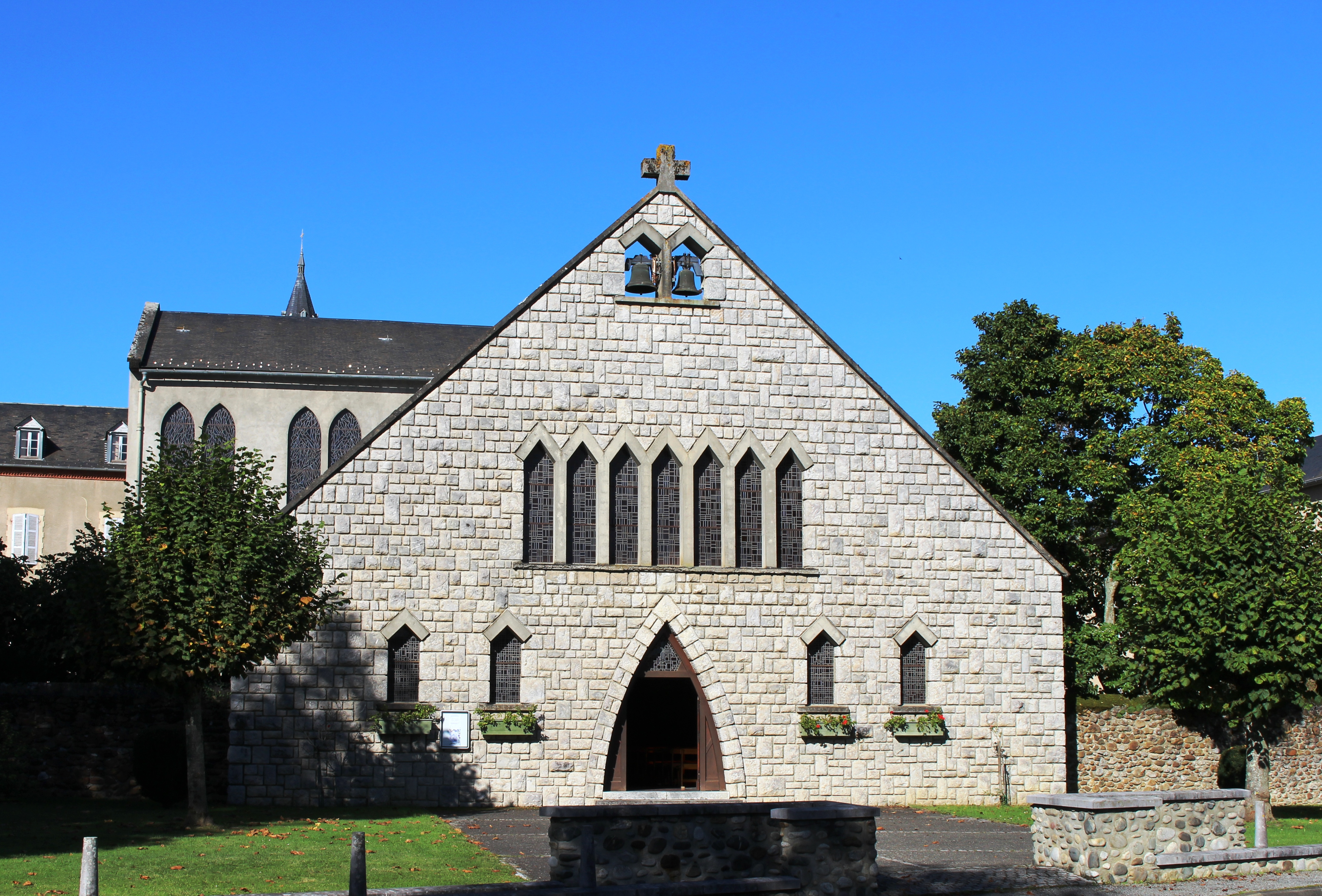 Église de l'Assomption de Cantaous (Hautes-Pyrénées)